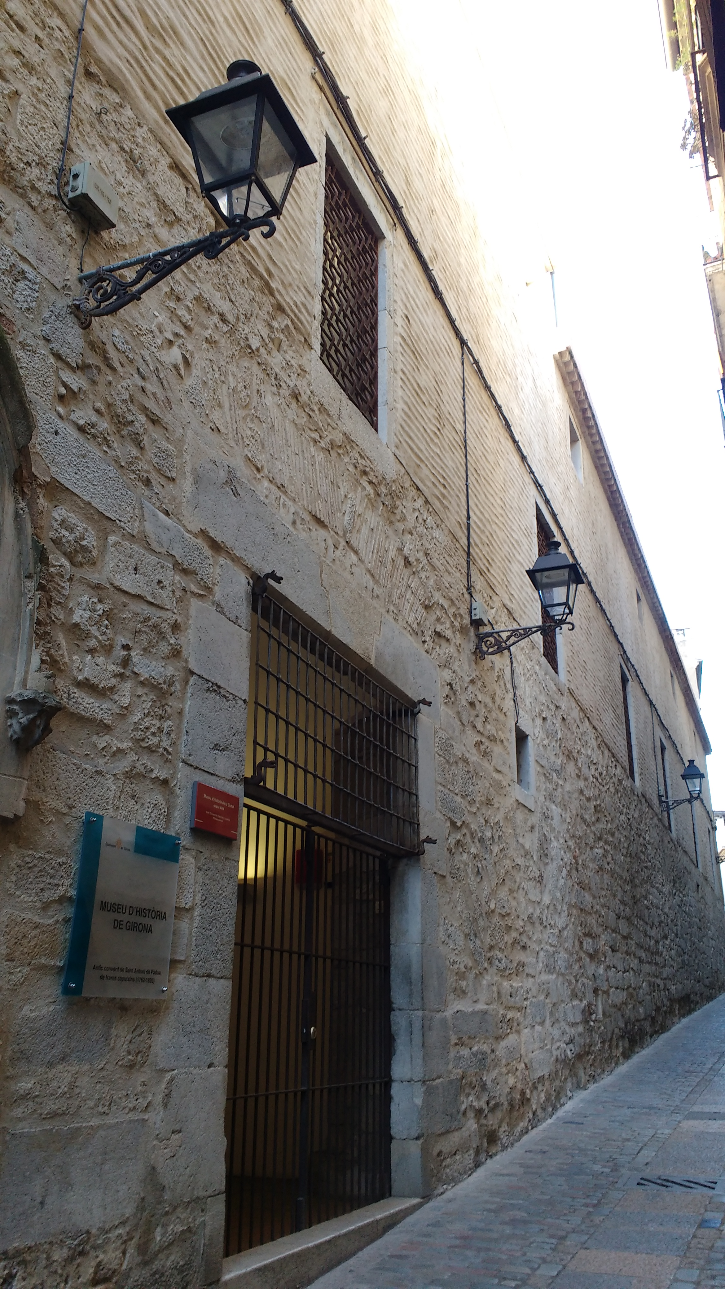 Entrada principal museu d'Història de Girona